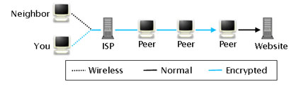 битблайндер принцип